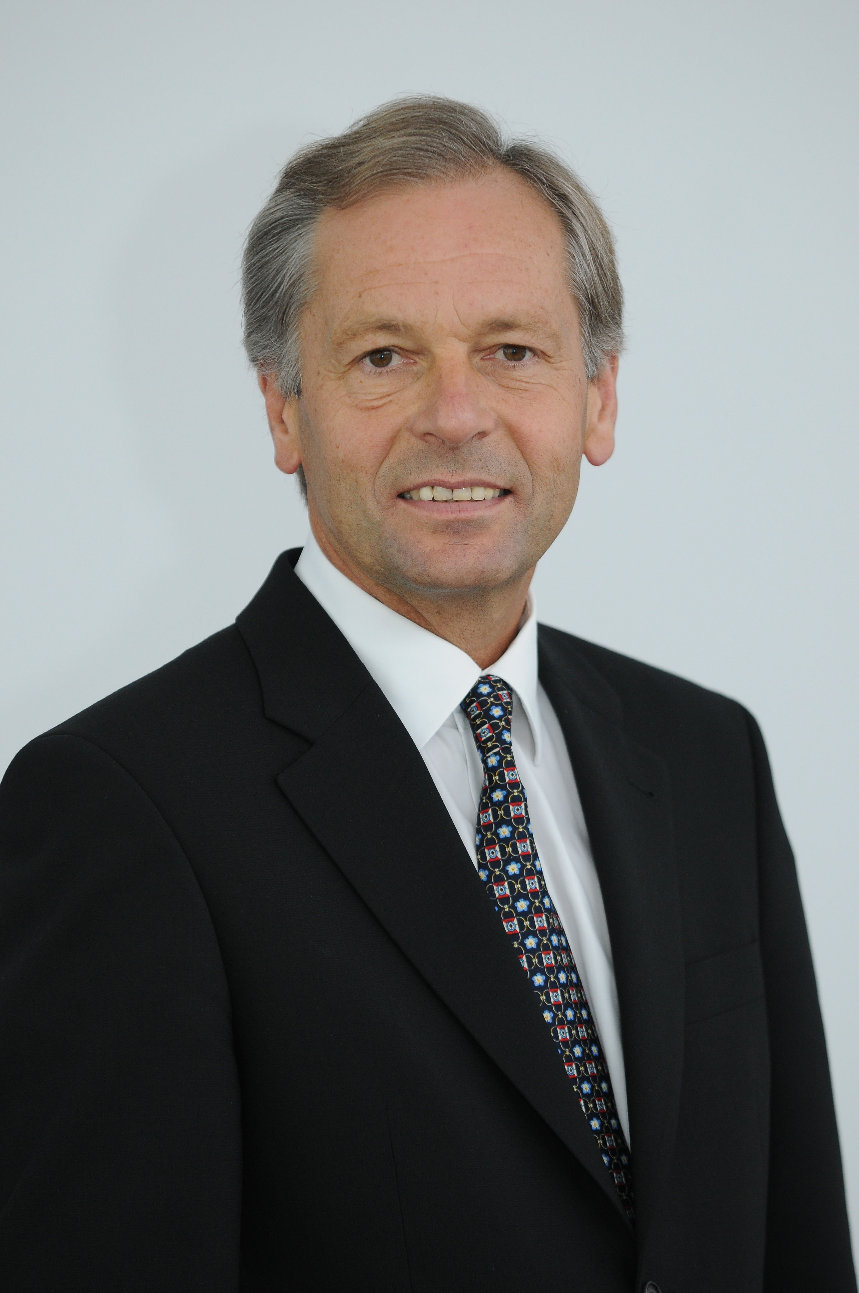 Portraitfoto Dr. Ivo Brunner, aufgenommen an der Pädagogischen Hochschule Vorarlberg